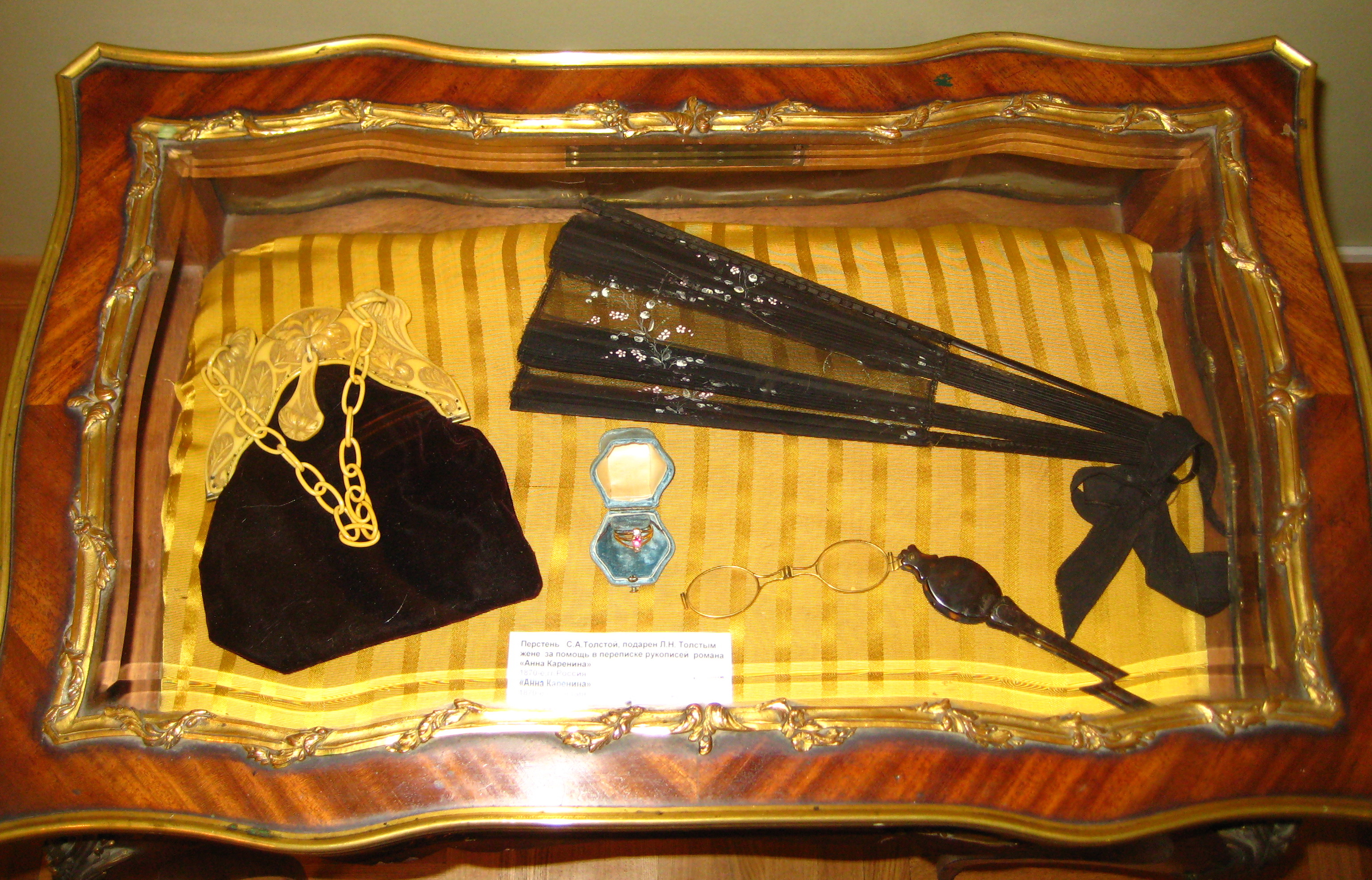 Государственный музей Л. Н. Толстого. Перстень, подаренной С.А. Толстой мужем в помощь за переписывание "Анны Карениной"